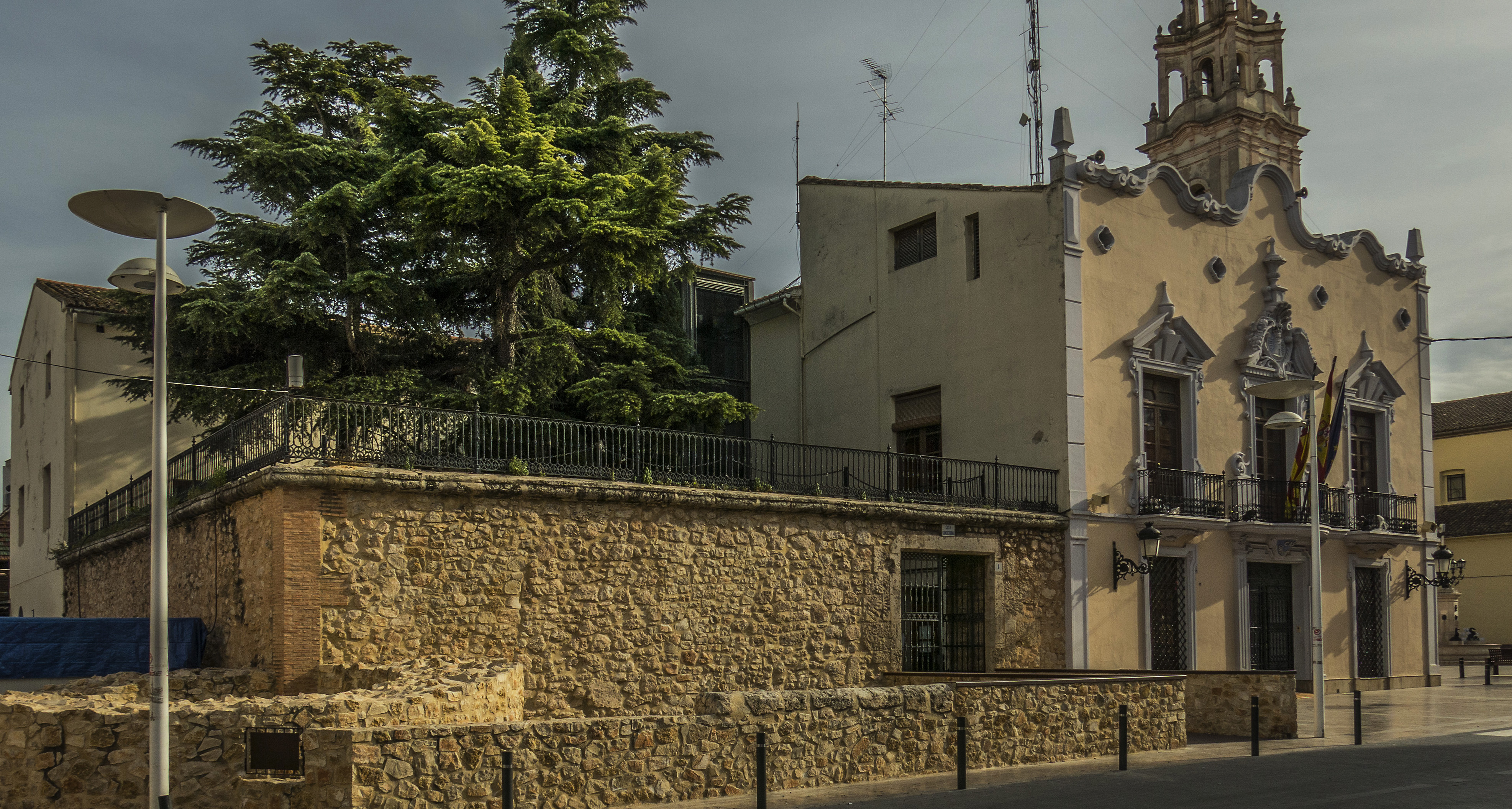 Alginet és un municipi del País Valencià situat a la comarca de la Ribera Alta. Limita amb Alfarb, Algemesí, Benifaió, Carlet i Guadassuar (a la mateixa comarca); i amb Almussafes i Sollana (a la comarca de la Ribera Baixa).